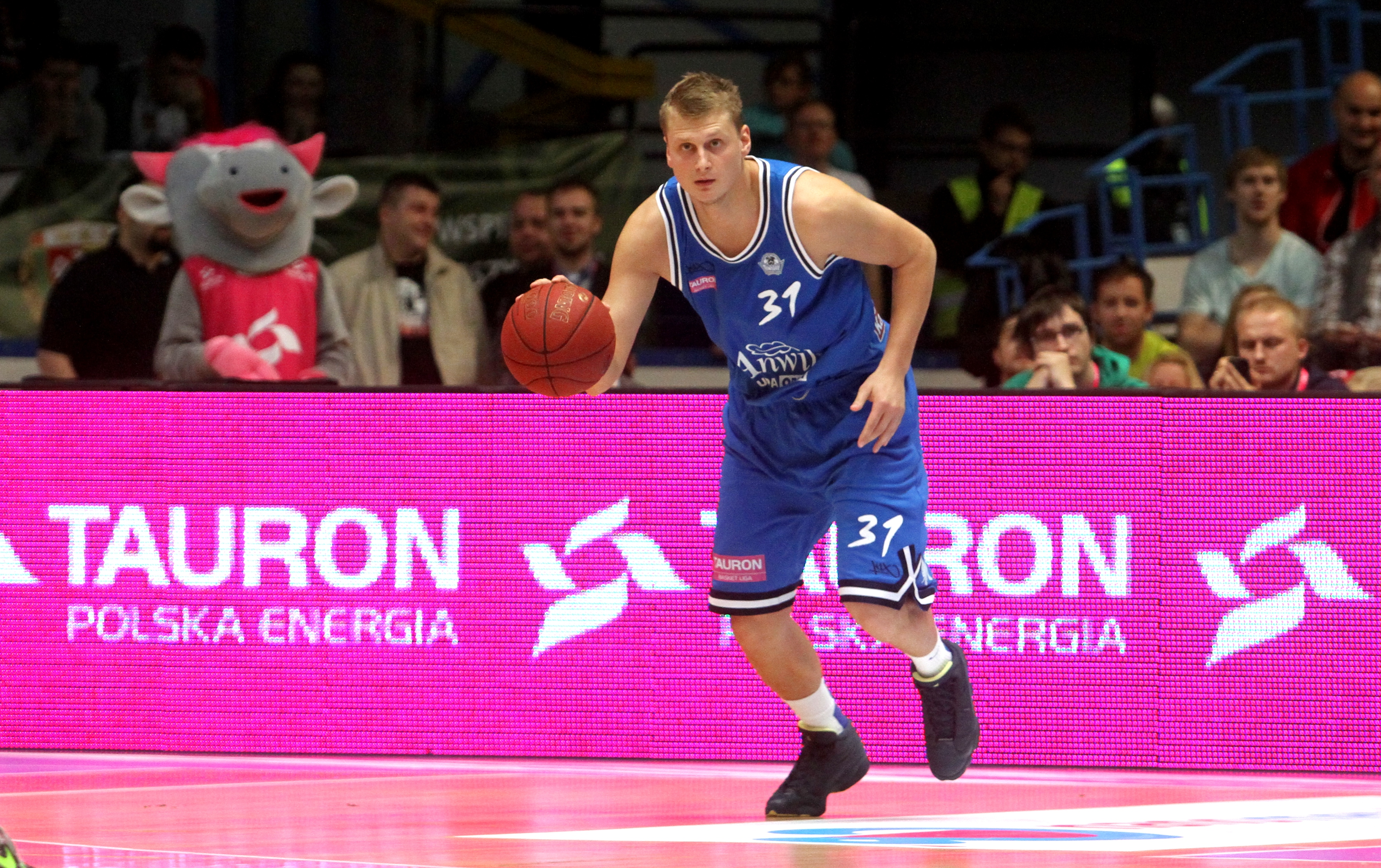 Mateusz Kostrzewski, Anwil Włocławek